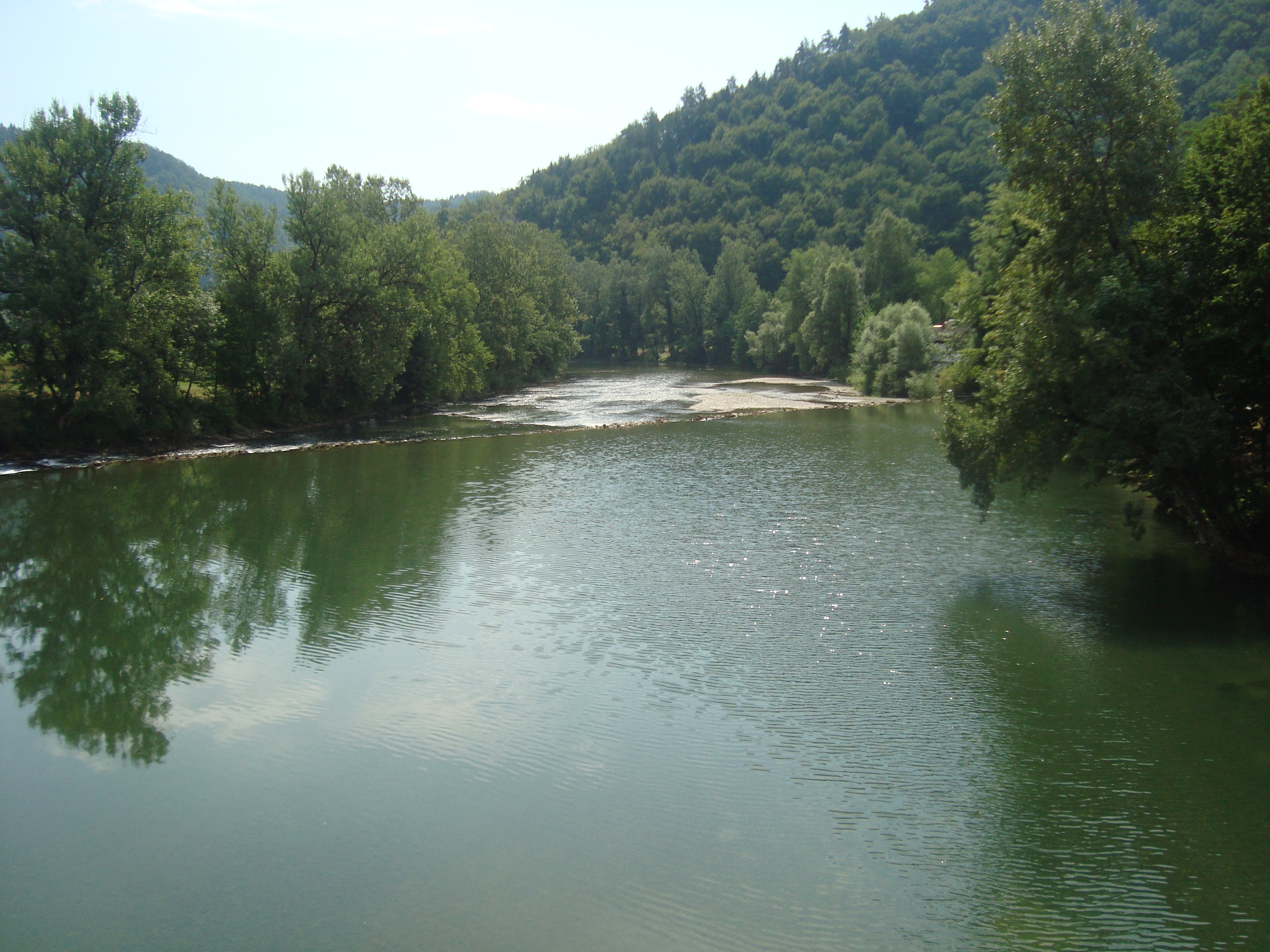 rijeka kupa